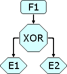 EPC XOR branch